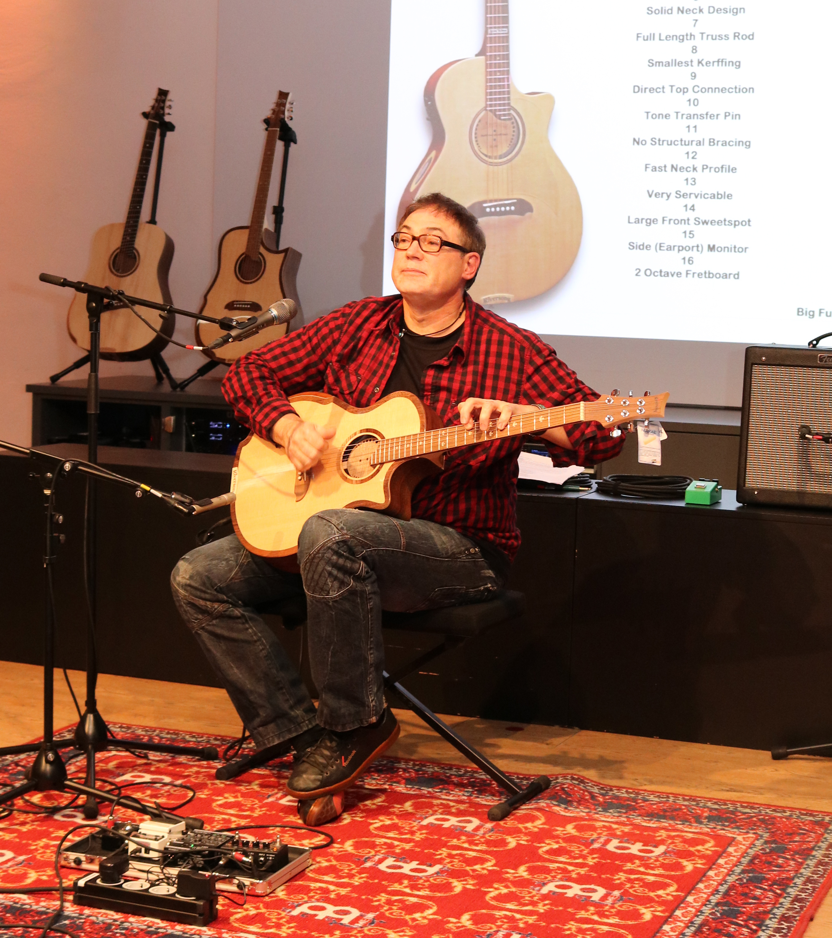 Don Alder bei einem Auftritt im Musikhaus Thoman in Treppendorf